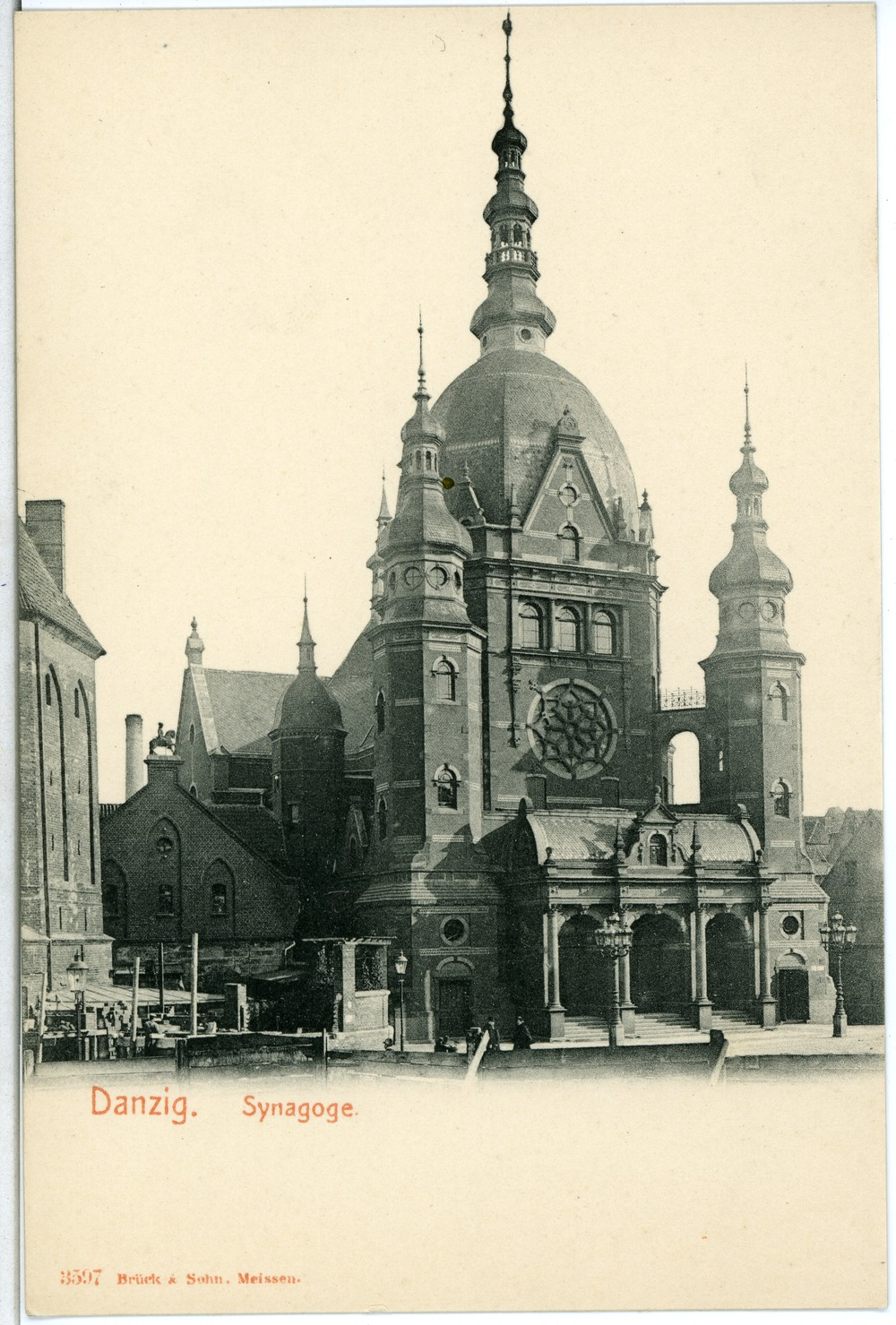 Danzig; Synagoge This postcard is from publisher Brück & Sohn in Meißen ( This postcard has a unique number 03597 and is available in a higher resolution at the publisher. This images was uploaded in a cooperation project between Wikipedians and the publisher.